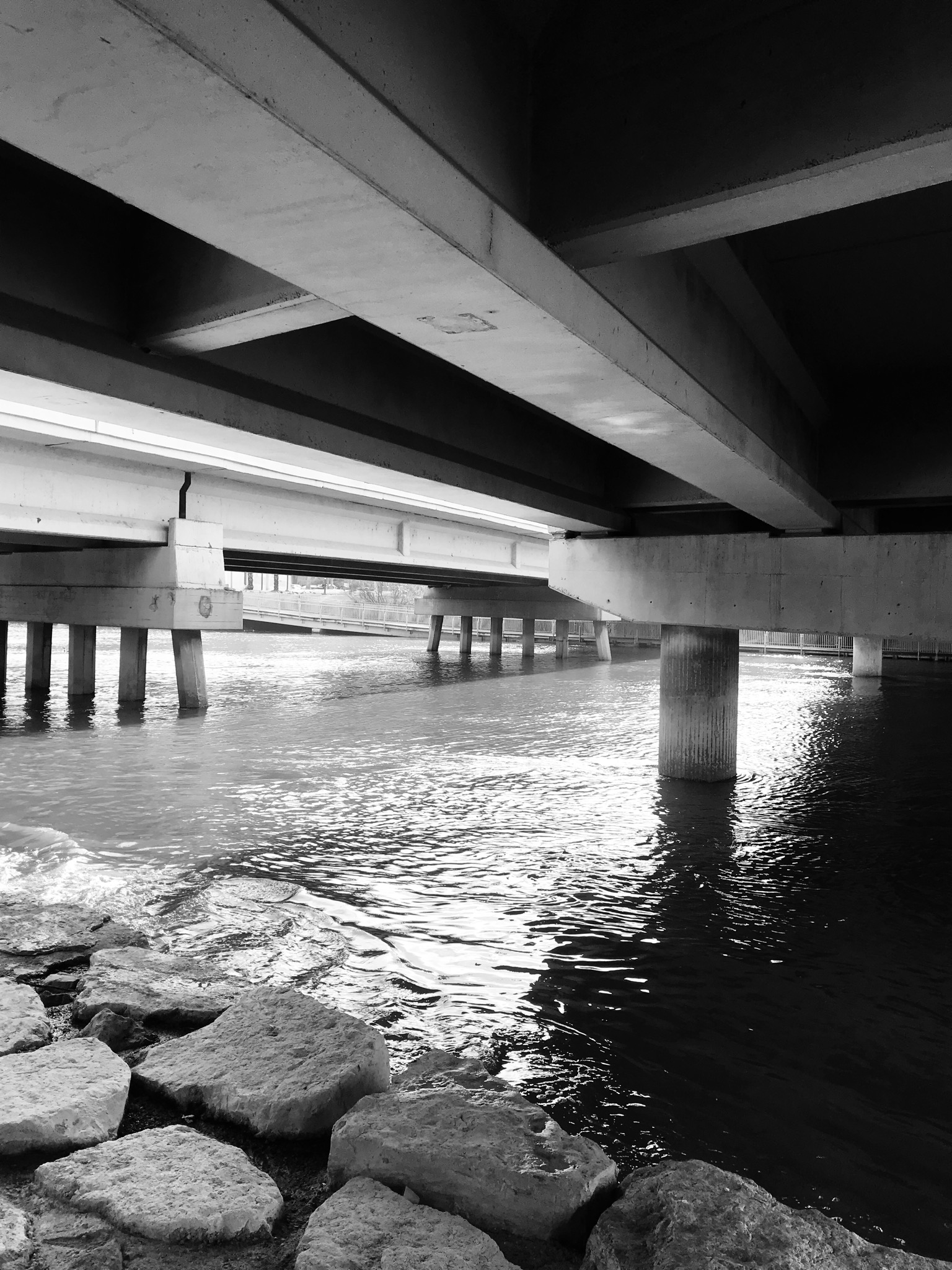 גשר בן אליעזר מבט מלמטה מעבר